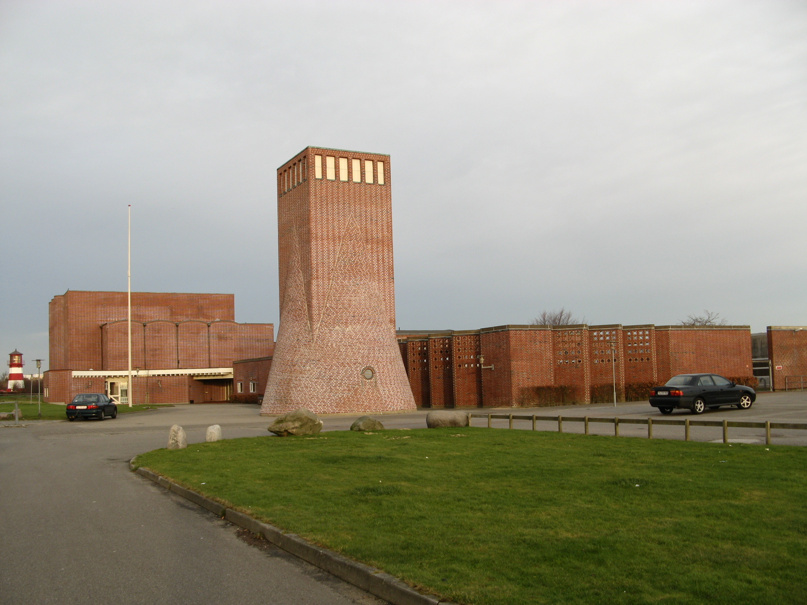 Sædding Kirke, Sædding sogn, Esbjerg kommune (former: Skads Herred, Ribe Amt). Kirken set fra vest